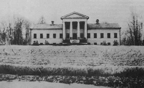 Беларуская (тарашкевіца): Раванічы (Ravaničy), сядзіба Слатвінскіх (Słatvinski)